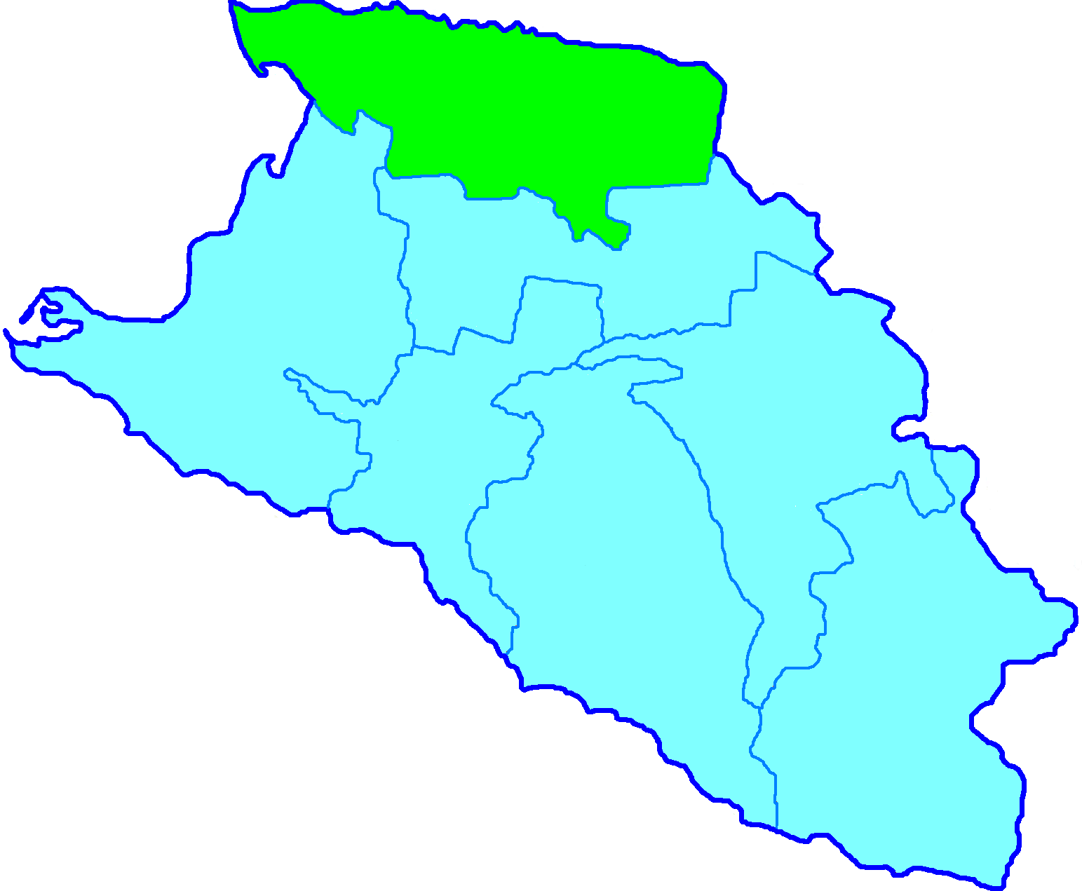 Yeiski otdel Kuban oblast.